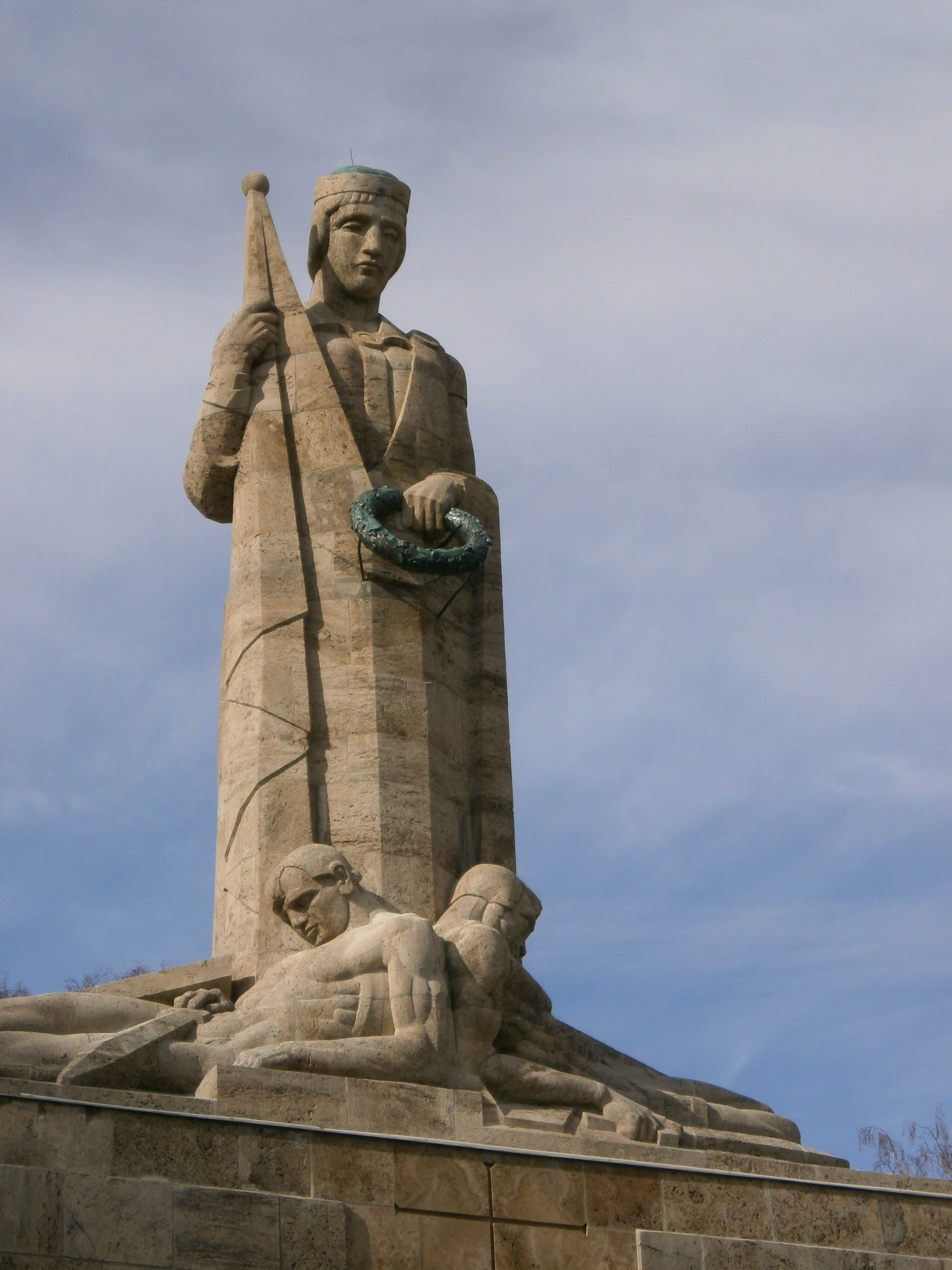 Brāļu kapu ansamblis, Rīga, Aizsaules iela 1b